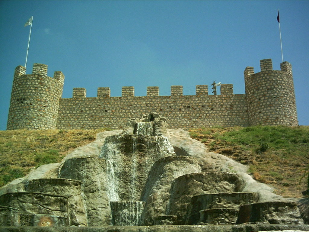 Şereflikoçhisar'ın girişine yaptırılan Kale'den bir görünüş.